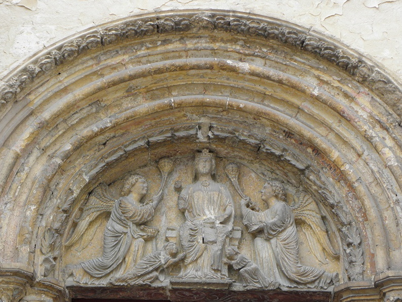 Tympan du portail méridional de l'église Notre-Dame de Donnemarie-Dontilly (77). .